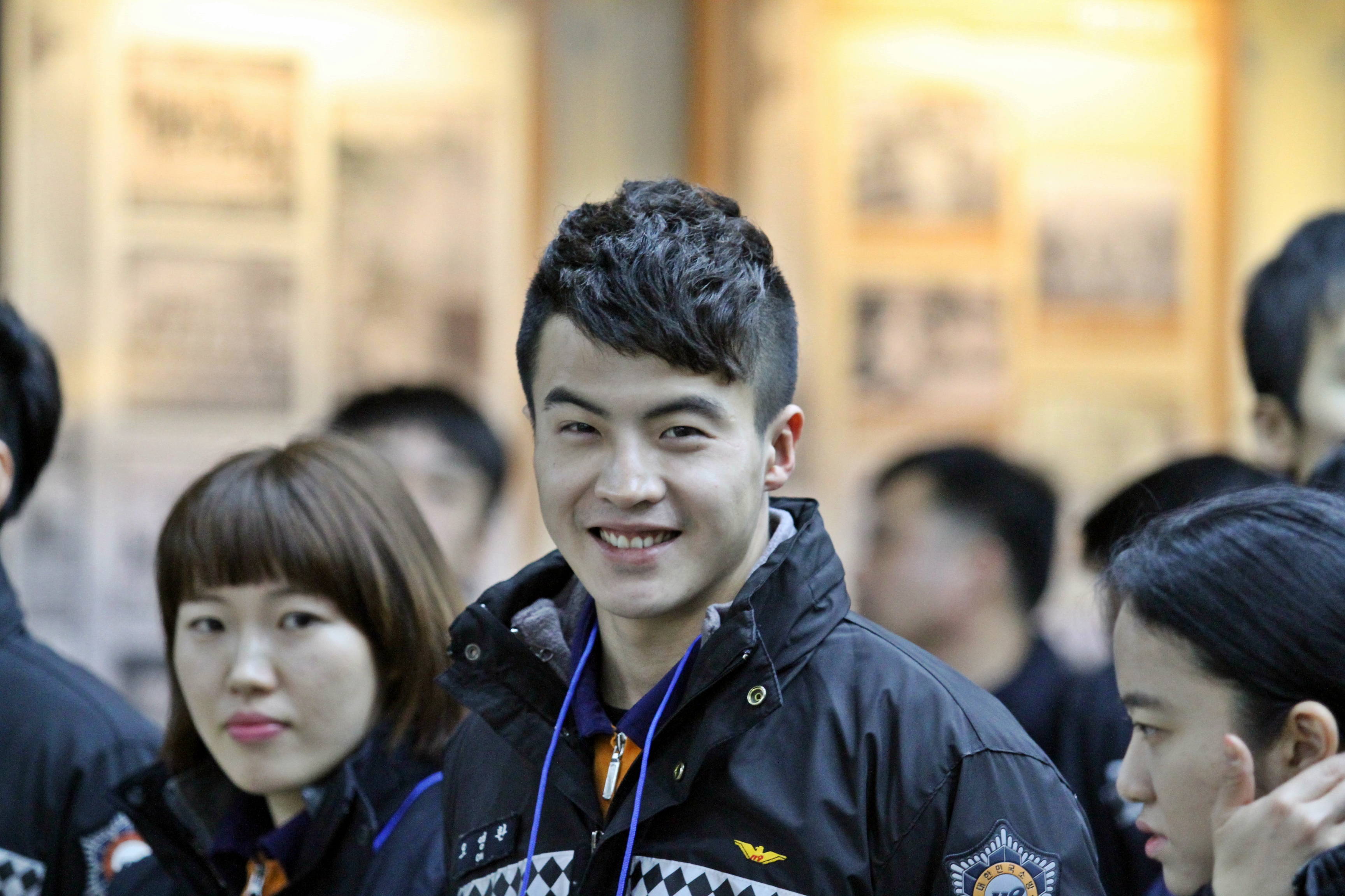 오영환, 2015년 1월 경기도 남양주시 중앙119구조본부 도전!안전골든벨 한국방송공사 KBS 1TV 소방관 특집방송